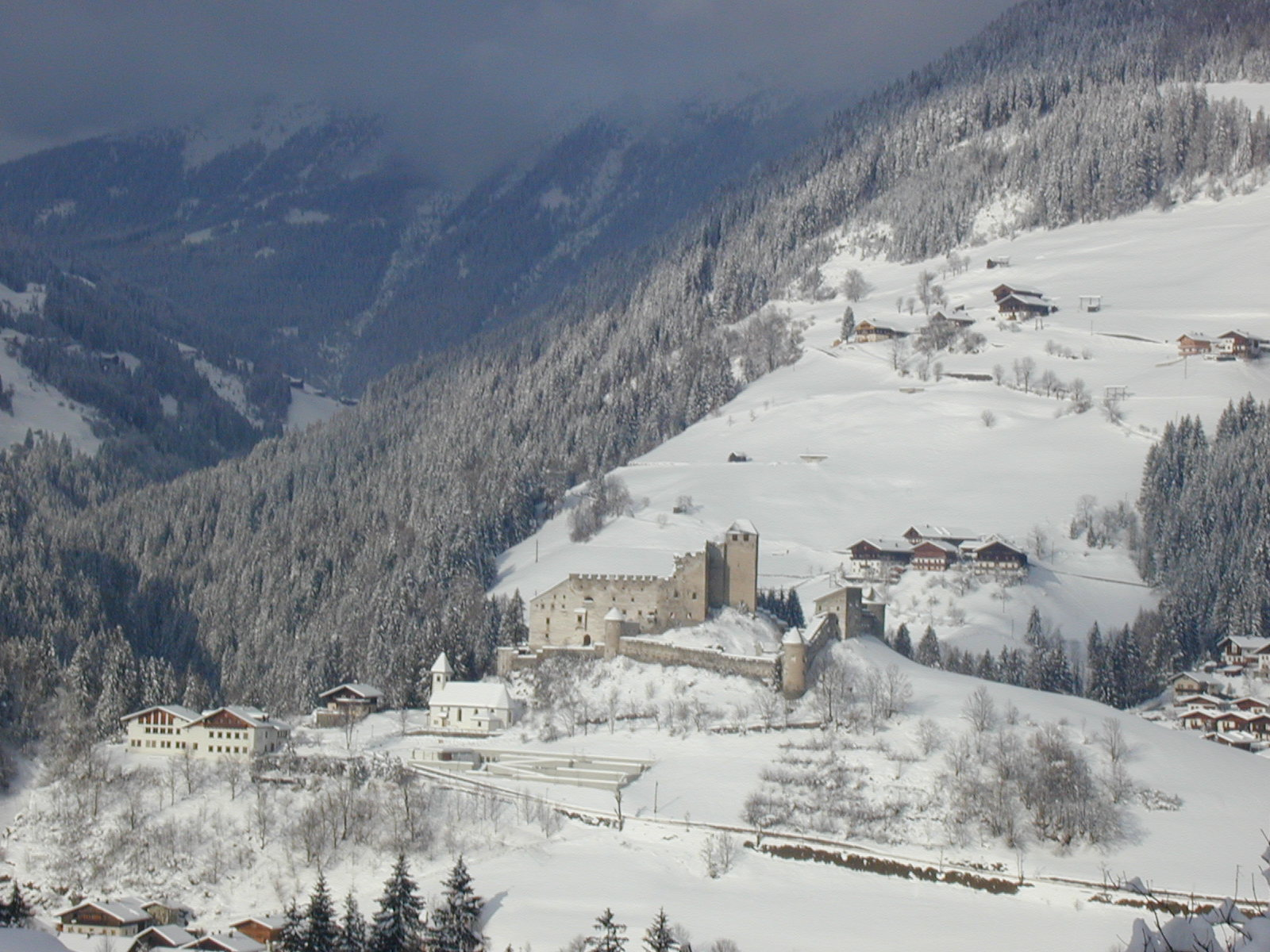 Das Bild zeigt die Burg Heinfels. Im Vordergrund die Kirche St. Peter und unterhalb die Volksschule. Im Hintergrund eröffnet sich dem Betrachter der Blick in das Villgratental.